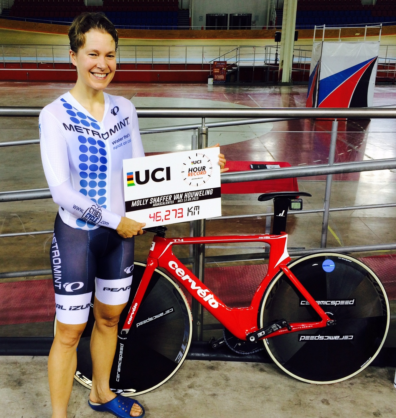 Molly Shaffer Van Houweling, Stundenweltrekord im Velodromo Bicentenario in Aguascalientes, Mexiko